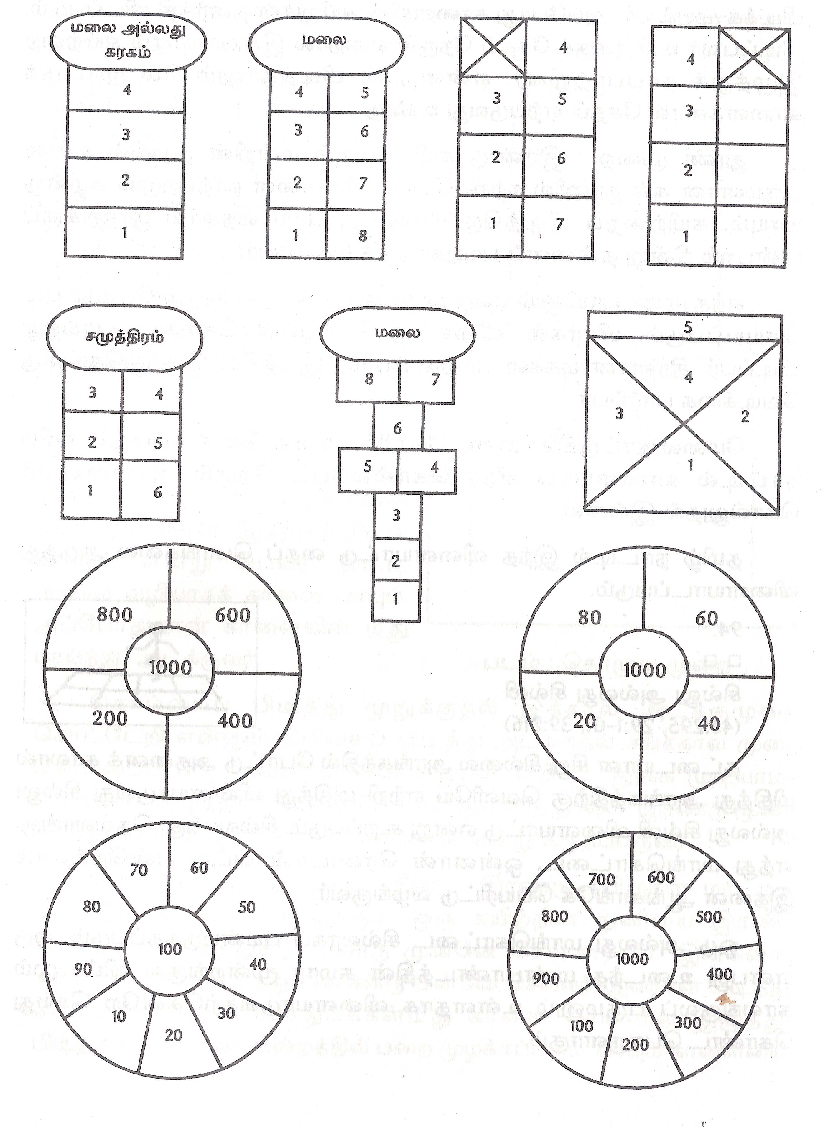 Line drawings of the courts used in one-leg walking (Lameing) game, an indigenous game in India, was famous up to 1950. Source is scanned from the book “vanishing games of Tamil Nadu” மறைகின்ற விளையாடுகள் published in 2002. The author of the book is the up-loader